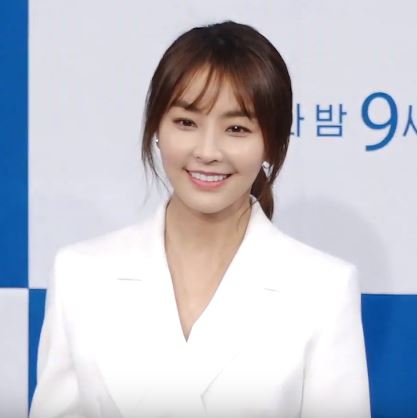 MBC 새 월화드라마 '검법남녀 시즌2' 제작보고회가 3일 오후 서울시 마포구 상암동 MBC신사옥에서 열렸다.